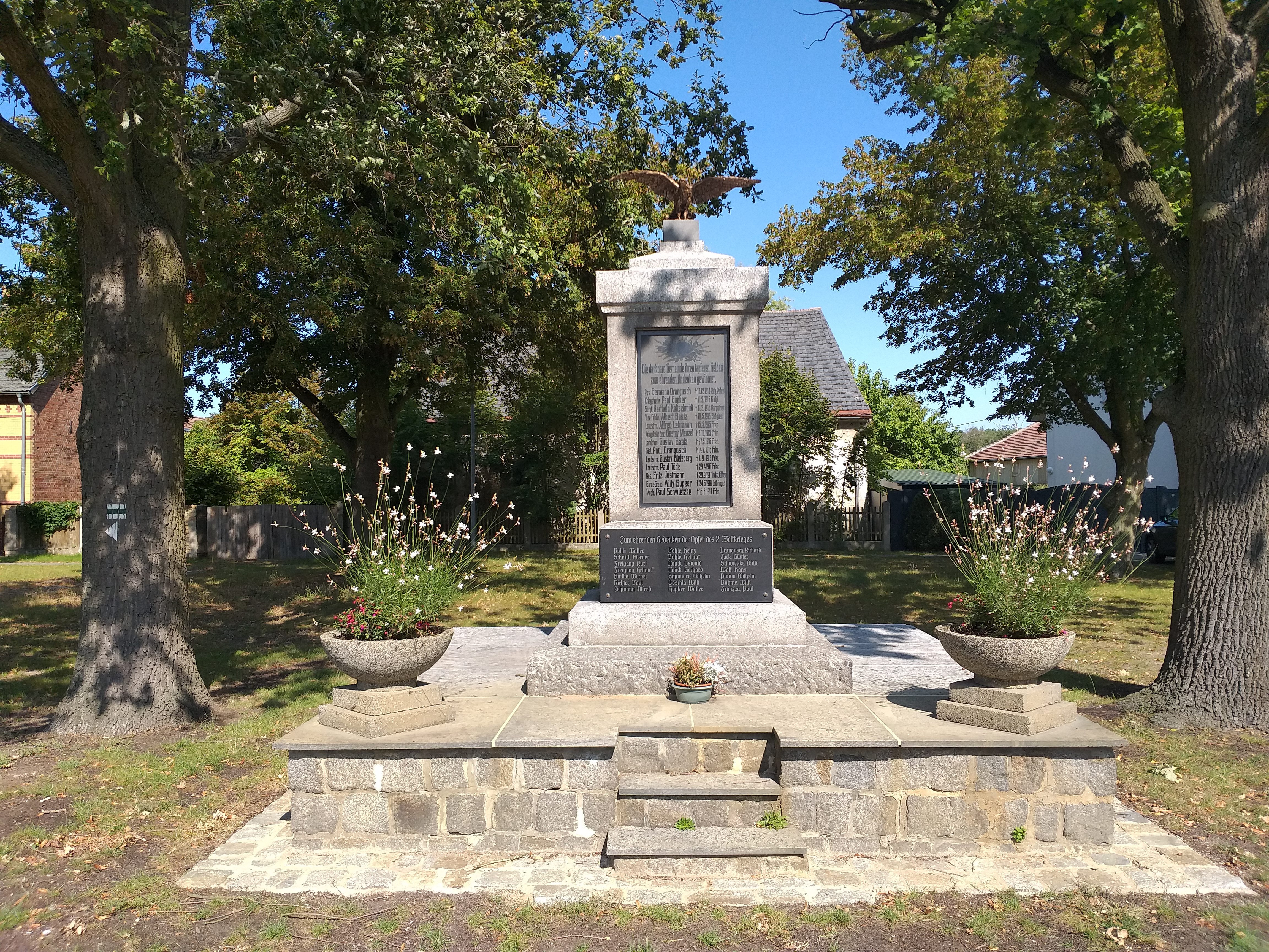 Denkmal für die gefallenen Soldaten der beiden Weltkriege in Hartmannsdorf am Dorfanger.